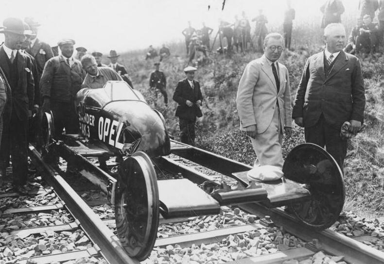 Der sensationelle Start des ersten Raketenwagens auf Eisenbahnschienen in Burgwedel bei Hannover. Der Raketenwagen auf Schienen erreichte eine Stundengeschwindigkeit von 254 km und verbesserte den Weltrecord für Fahrzeuge auf Schienen um 39 km in der Stunde. Der Raketenwagen auf Schienen, auch Teufelswagen genannt, mit dem Construkteur Fritz von Opel vorn im Bilde links und dem Erfinder der Raketen-Construktion Ing. Sander, rechts vor der Weltrecordfahrt.